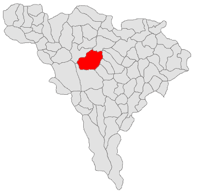 Categorie:Hărţi ale judeţului Alba